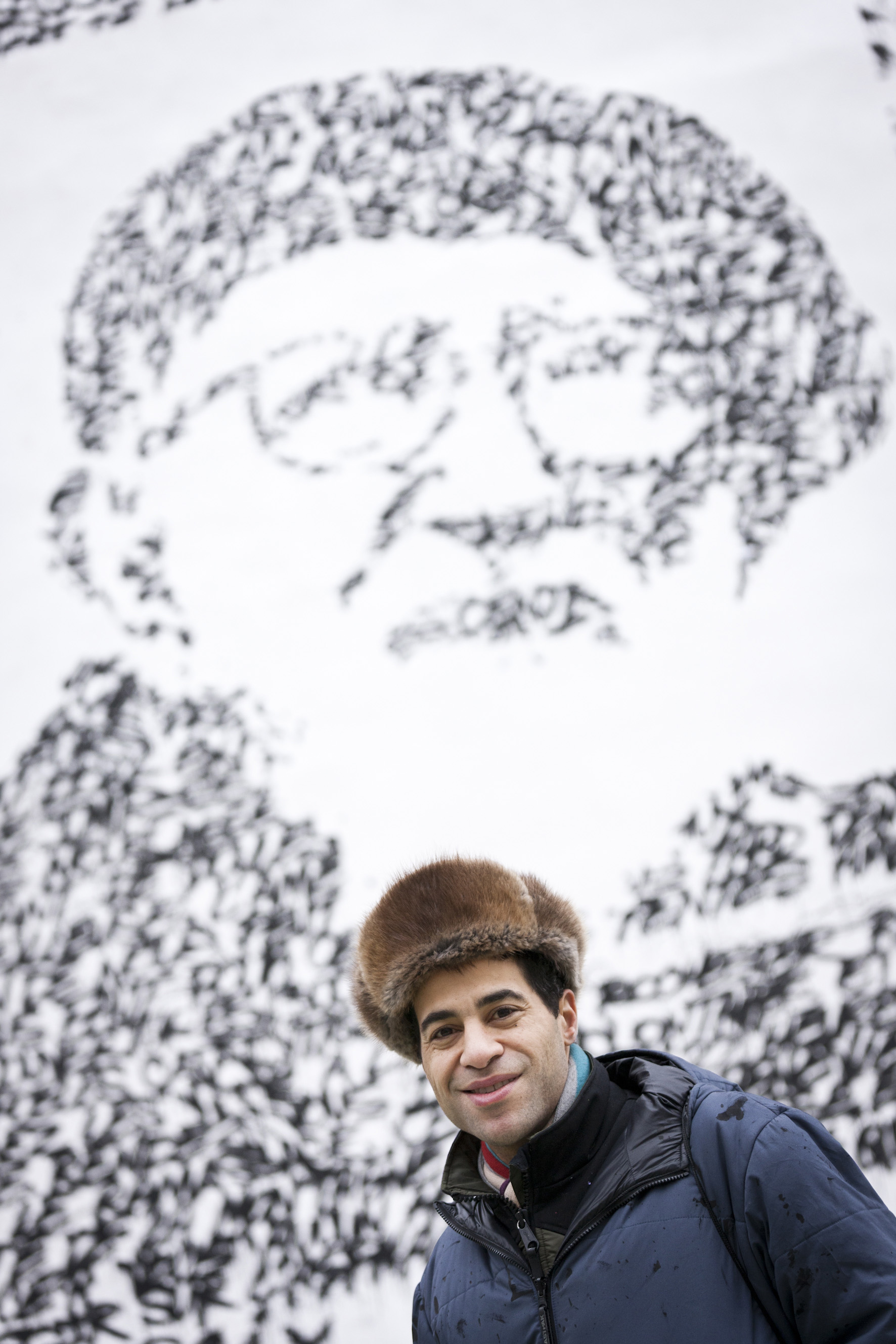 Fresque commémorative de l'abbé Pierre par JonOne réalisée le 22 janvier 2011.